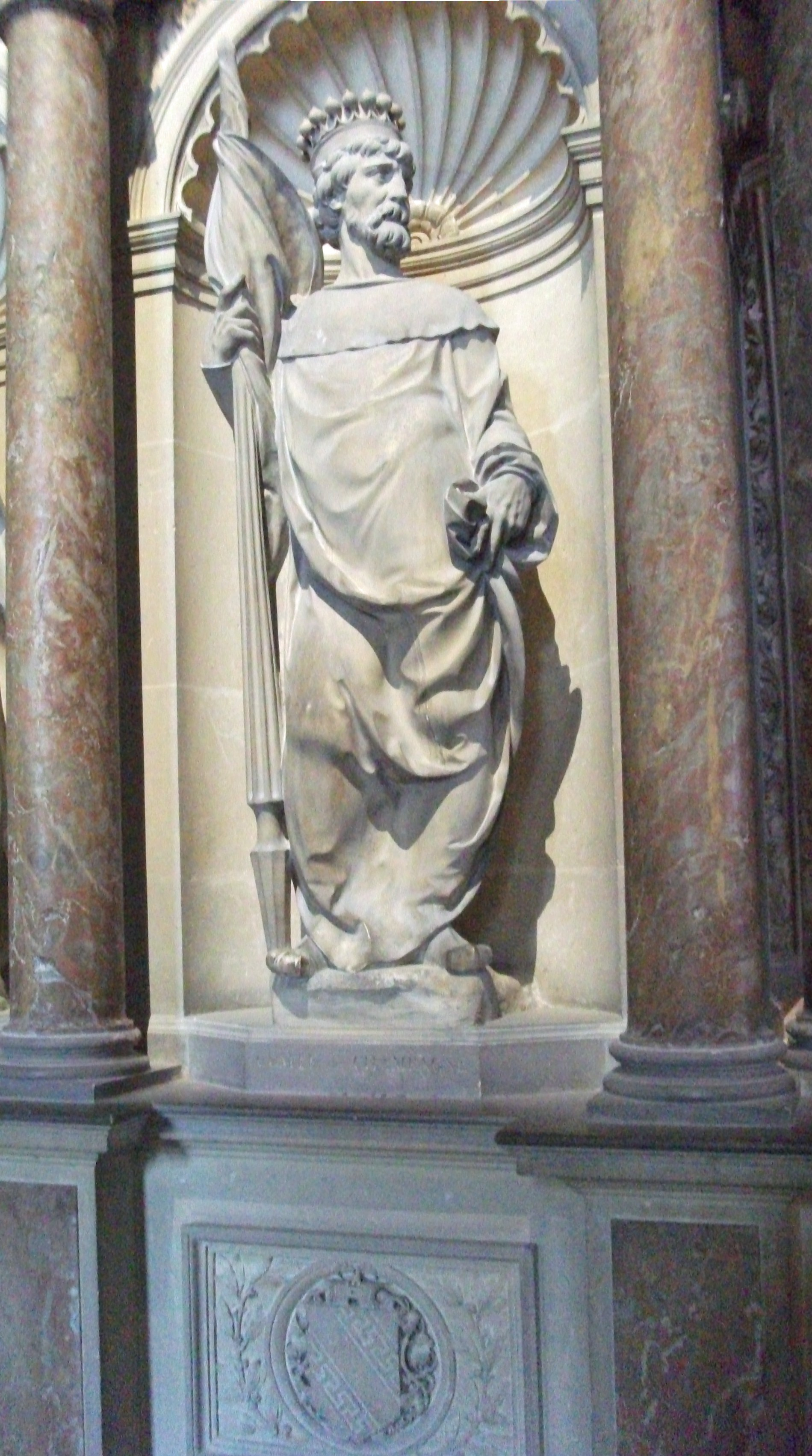 Template:Statue et blason du comte de Champagne sur le tombeau de st-Remi.